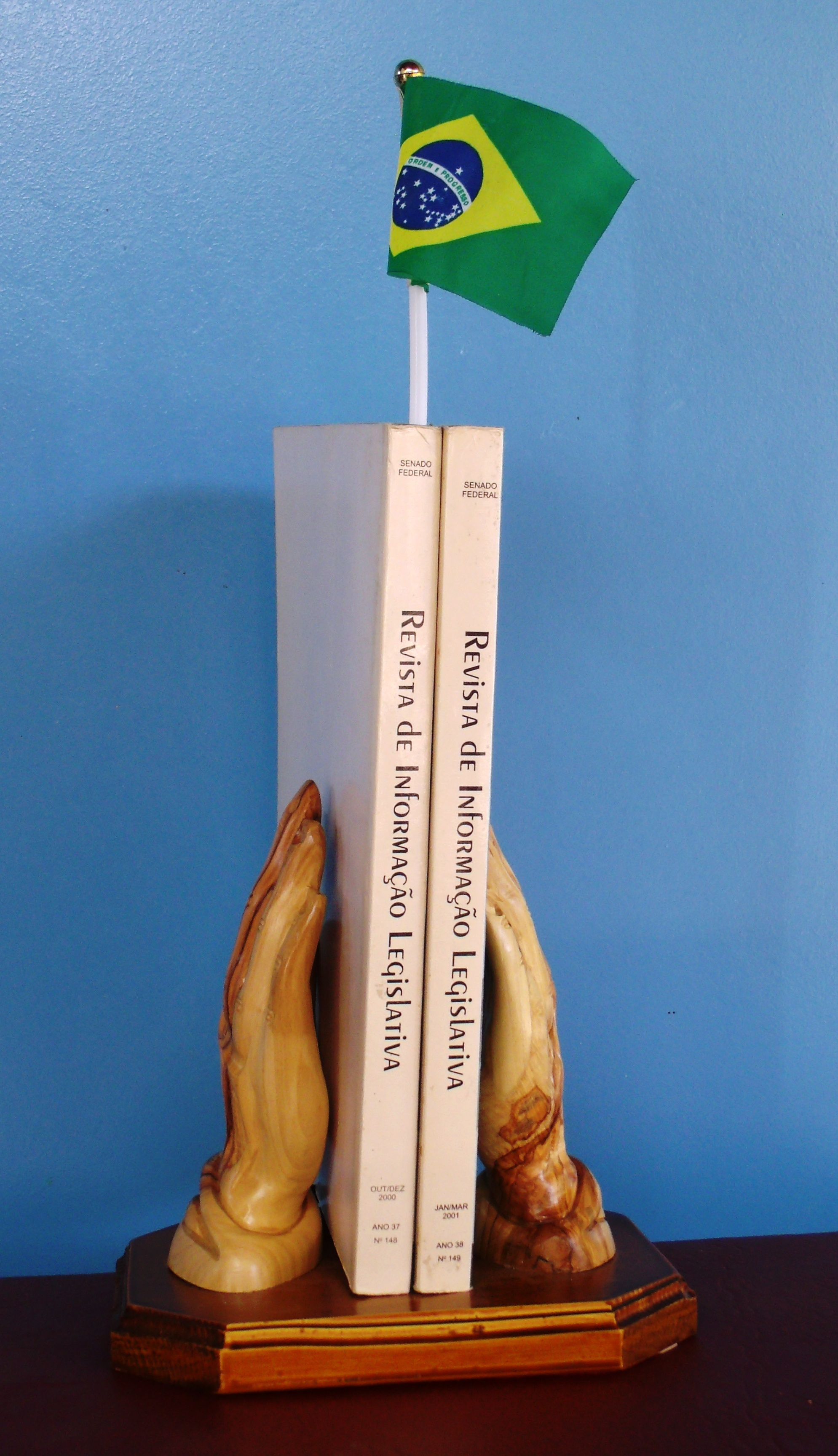 Edições 37 e 38 da Revista de Informação Legislativa, editada pelo Senado Federal do Brasil, em exposição numa Biblioteca Pública Municipal.